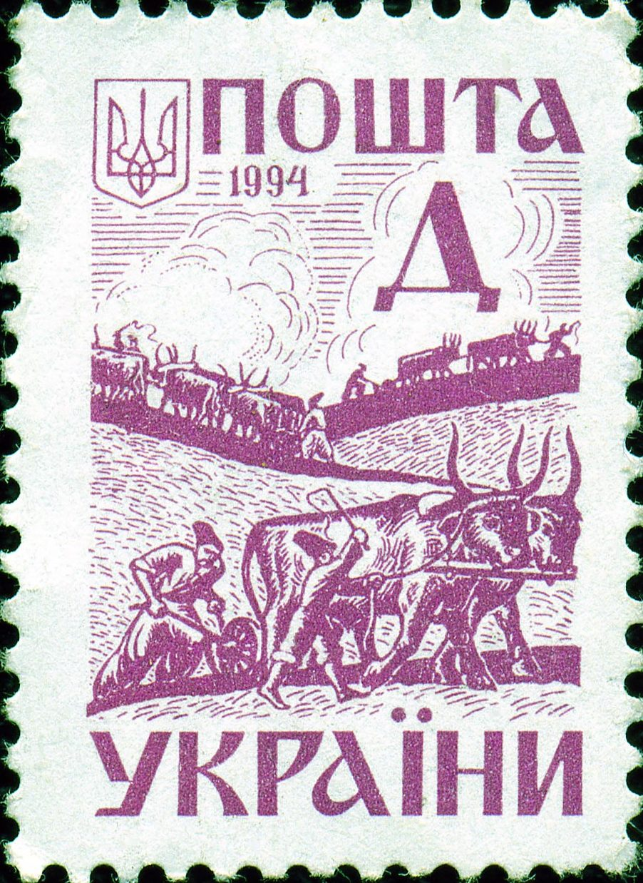 Стандартная почтовая марка Украины, без номинала из-за гиперинфляции (письма переоценялись по многу раз в год), литера Д, 1994 год. Изображены украинские крестьяне, пашущие на волах